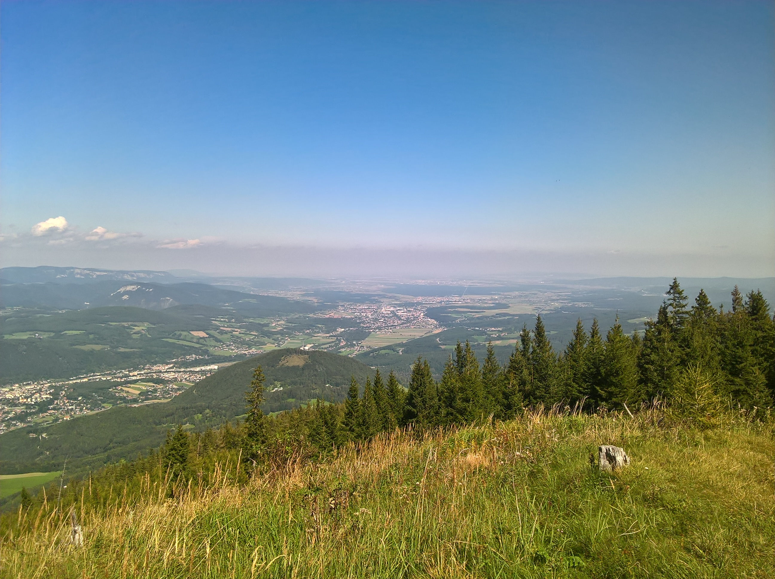 Sicht vom Großen Otter Richtung Wiener Becken. Links ist Gloggnitz zu sehen, in der Mitte Ternitz und Neunkirchen.